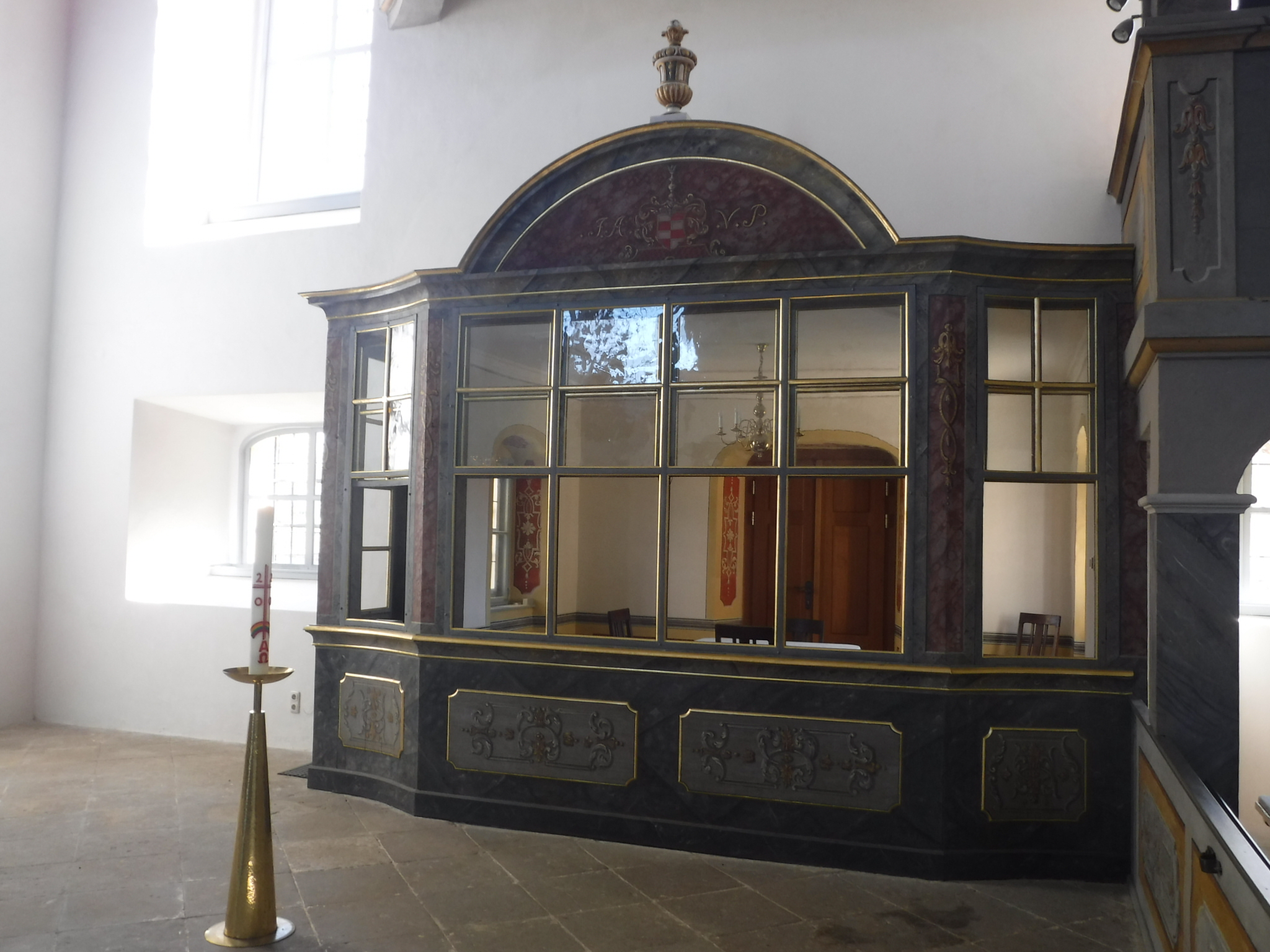 Die St. Bartholomäuskirche Klipphausen-Röhrsdorf